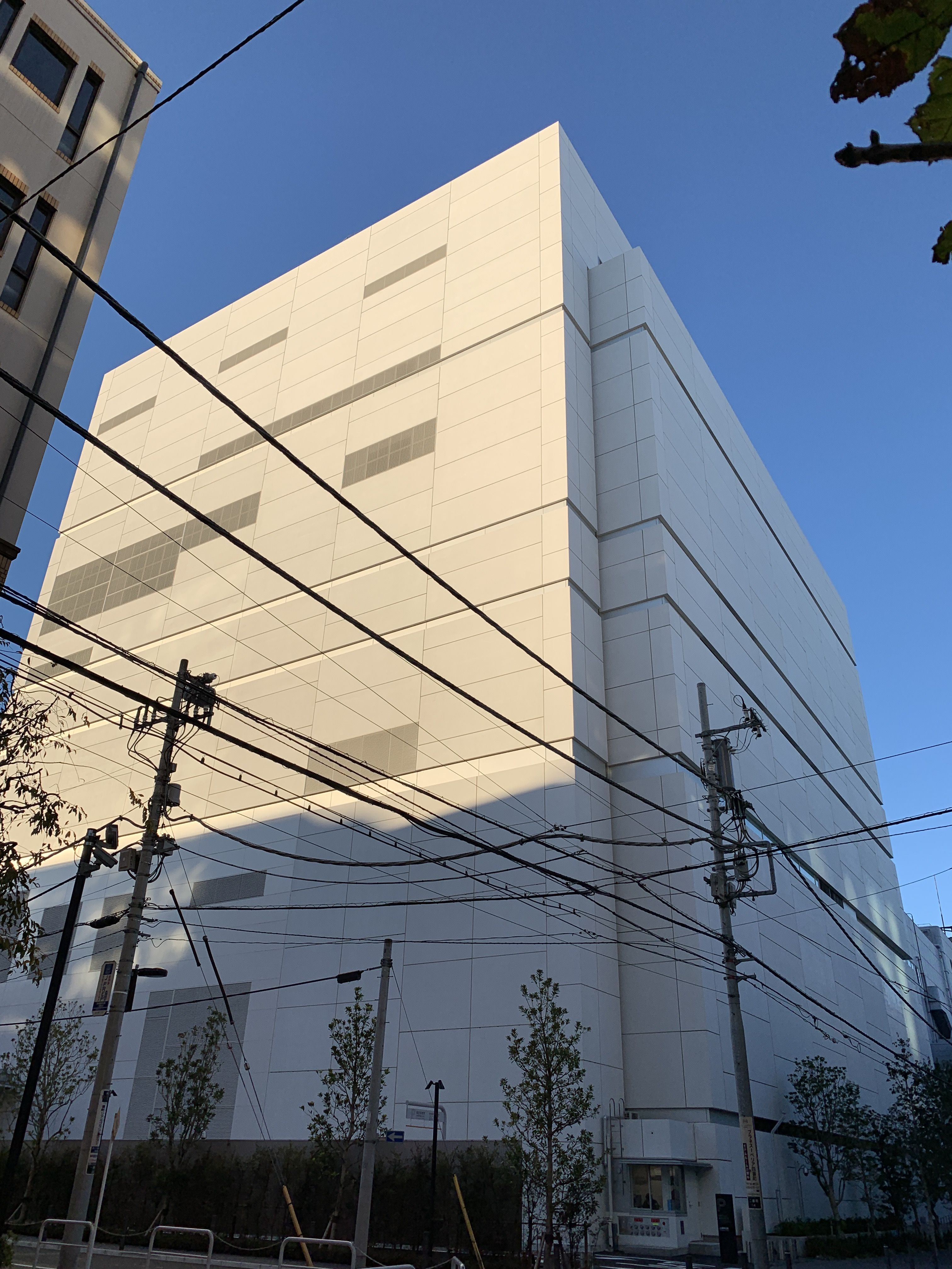 日本テレビ番町スタジオ。日本テレビ通りより入った女子学院側から、2018年11月23日撮影。